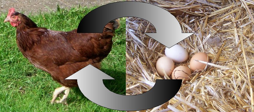 Le cycle de l'oeuf et de la poule